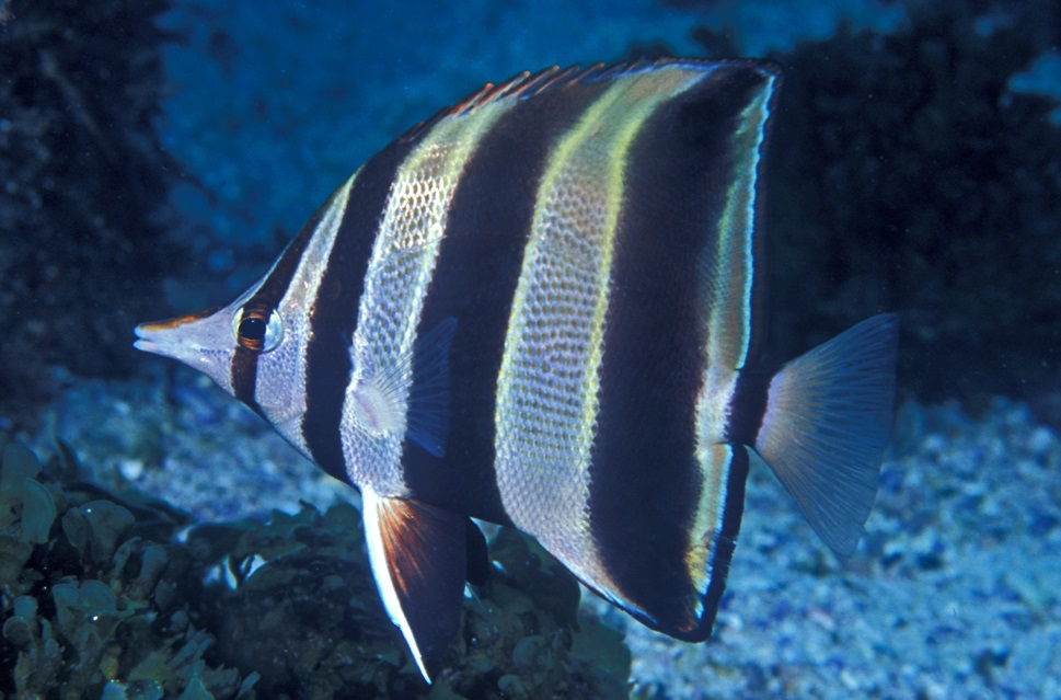 Chelmonops truncatus en North Solitary Island, Nueva Gales del Sur, Australia